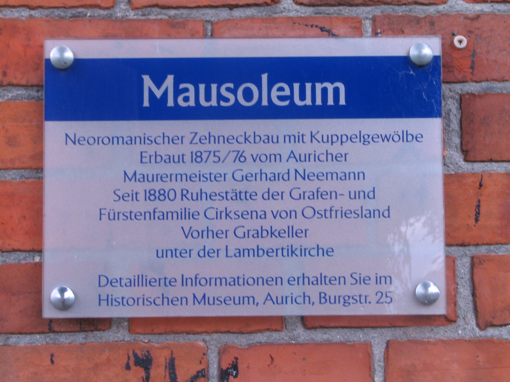 Informationstafel am Eingang